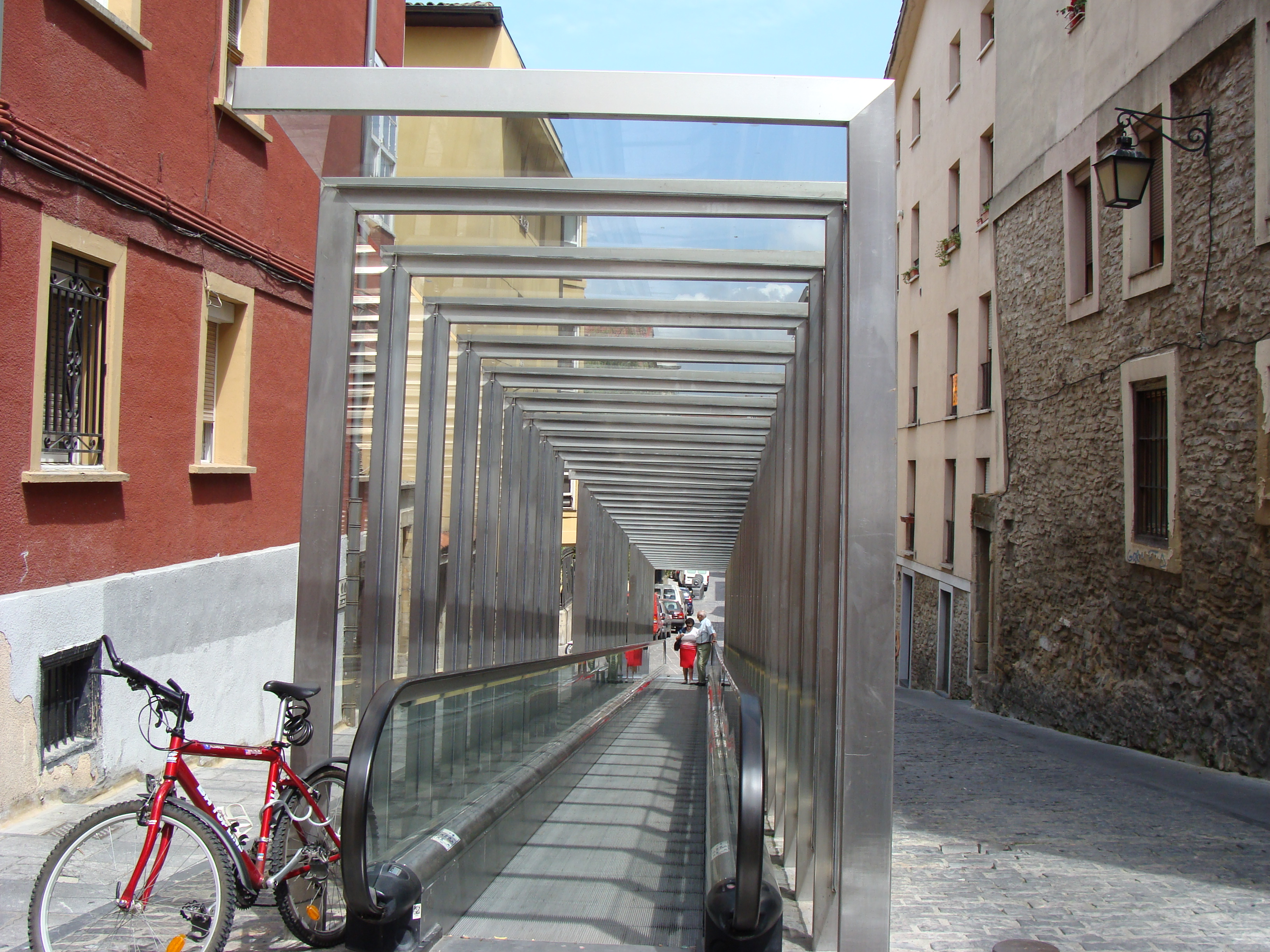 Rampa mecanizada para salvar los trechos de mayor desnivel en calles del casco urbano de Vitoria